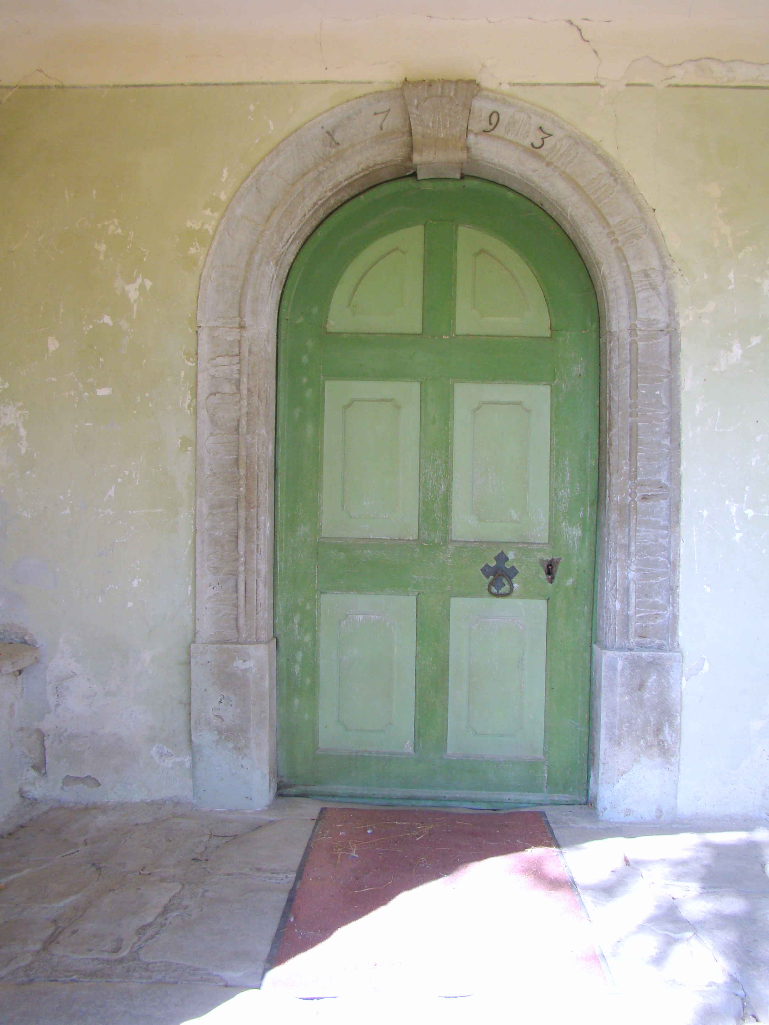 Biserica evanghelică fortificată, sat Șoarș; comuna Șoarș 282 sec. XV - XVI, 1806